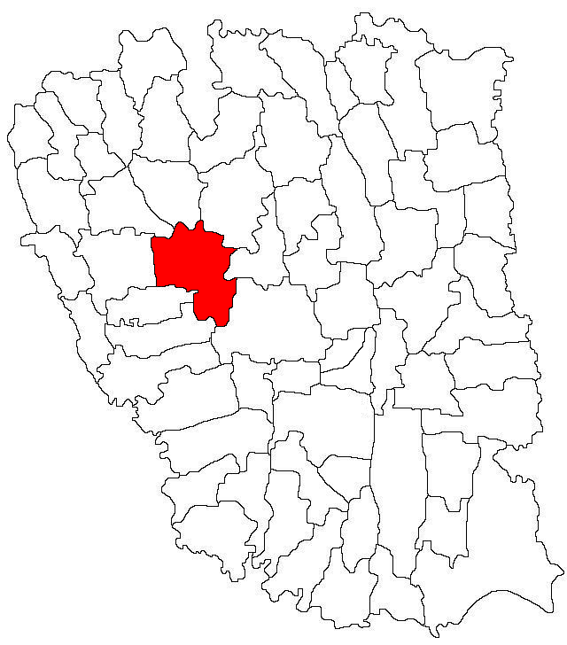 Categorie:Hărţi ale judeţului Galaţi